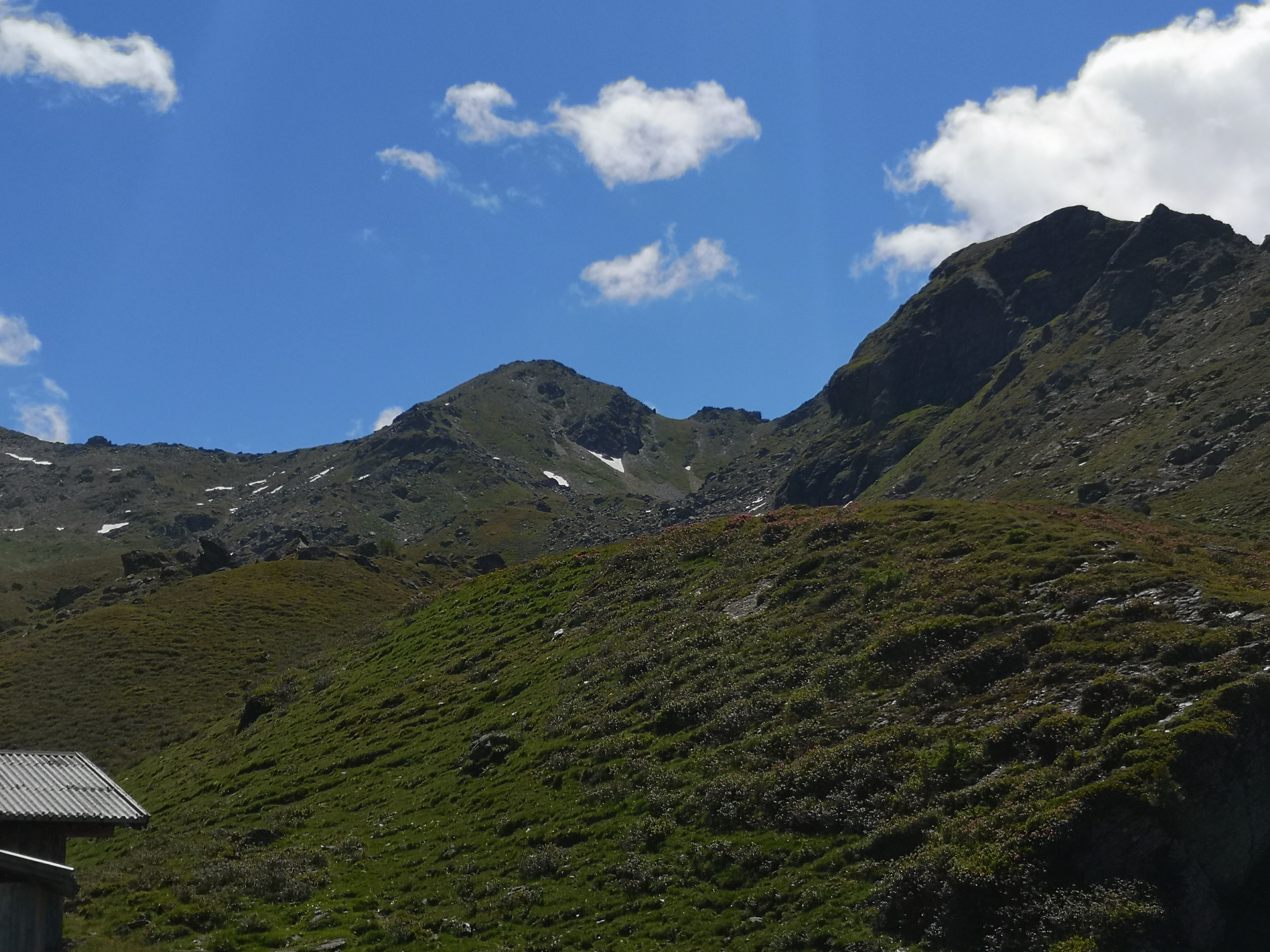 Diese Bergspitze istd er höchste Punkt der Gemeinde Ellbögen. Aus dem Arztal fotografiert - auf 2.000 Meter